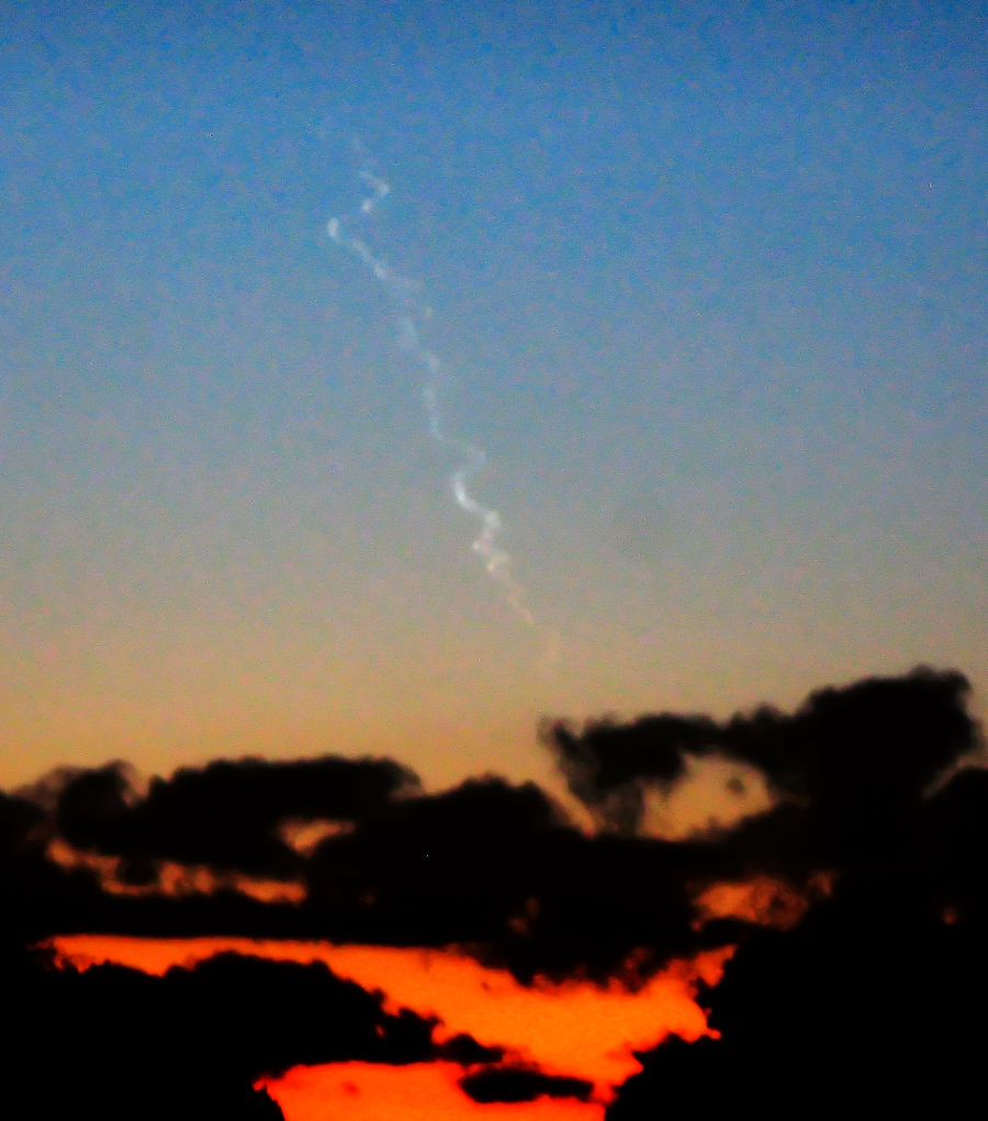 Feuermeteor vom 13. Oktober 2009 fotografiert von der A210 in Höhe Achterwehr/SH